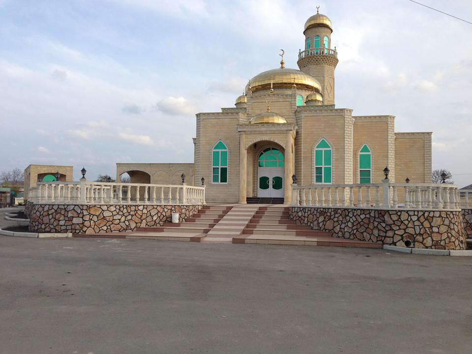 Мечеть в ауле Коноковский